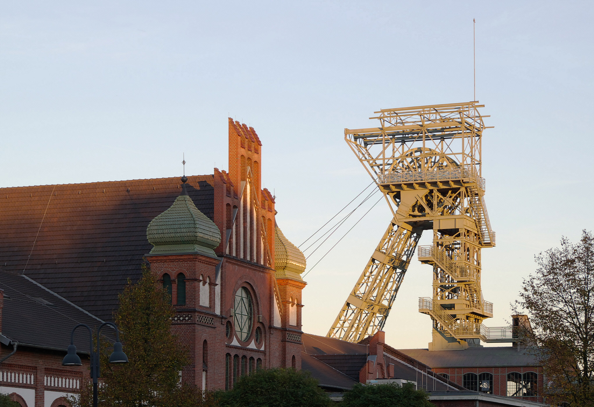 Zeche Zollern, Dortmund, in der Abendsonne